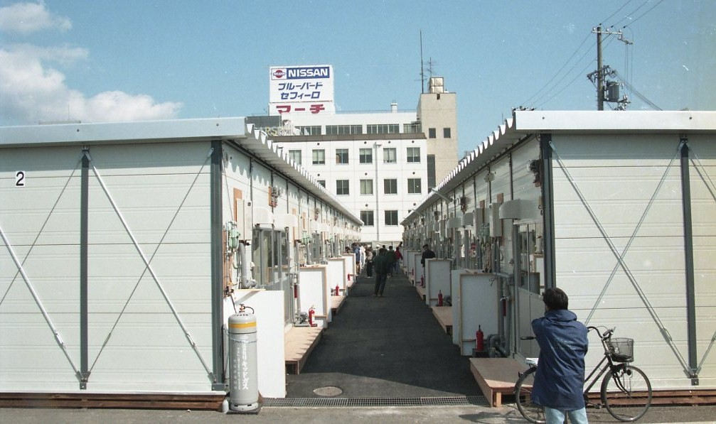 脇浜町3丁目周辺 仮設脇ノ浜住宅（1995年2月15日）